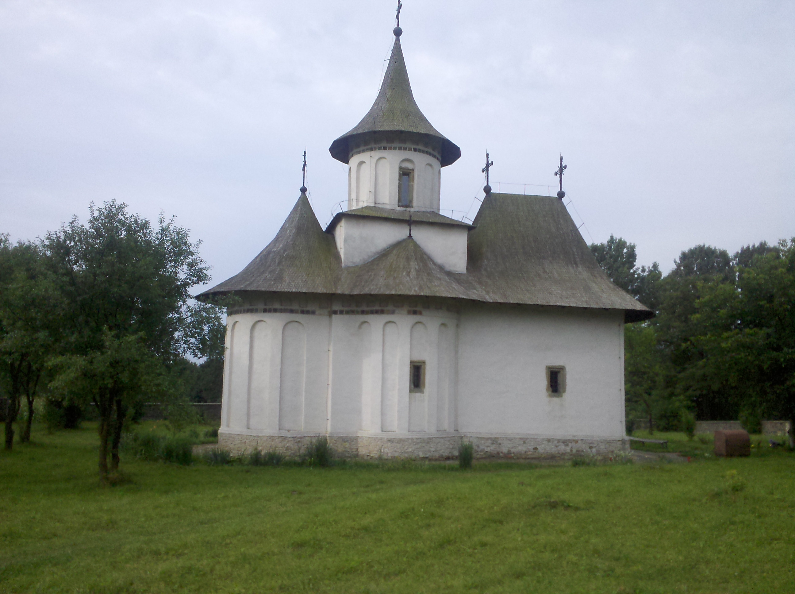 iglesia de Pătrăuţi, la primera iglesia guardada hasta hoy de Estaban el Grande de Moldavia